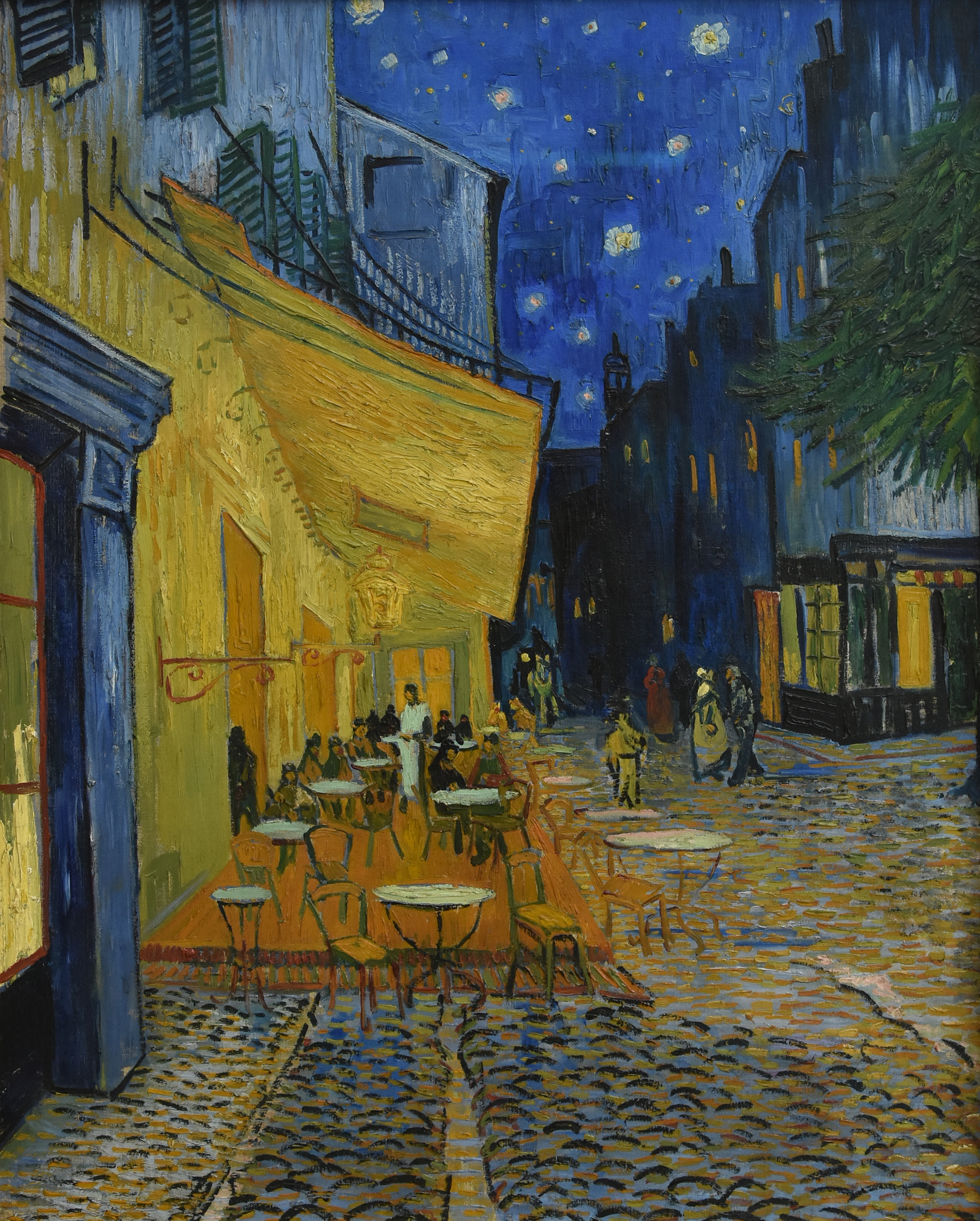 Vincent van Gogh (1853-1890) Caféterras bij nacht (place du Forum) - Kröller-Müller Museum Otterlo